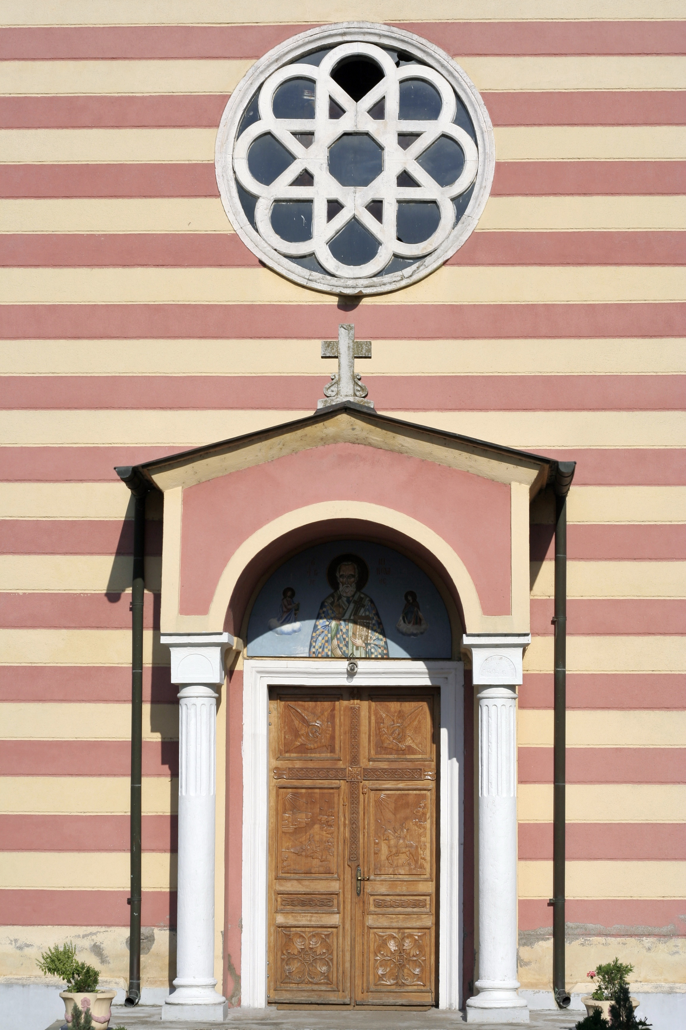 Manastir Grabovac, ulazna vrata